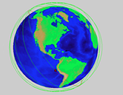 SORS